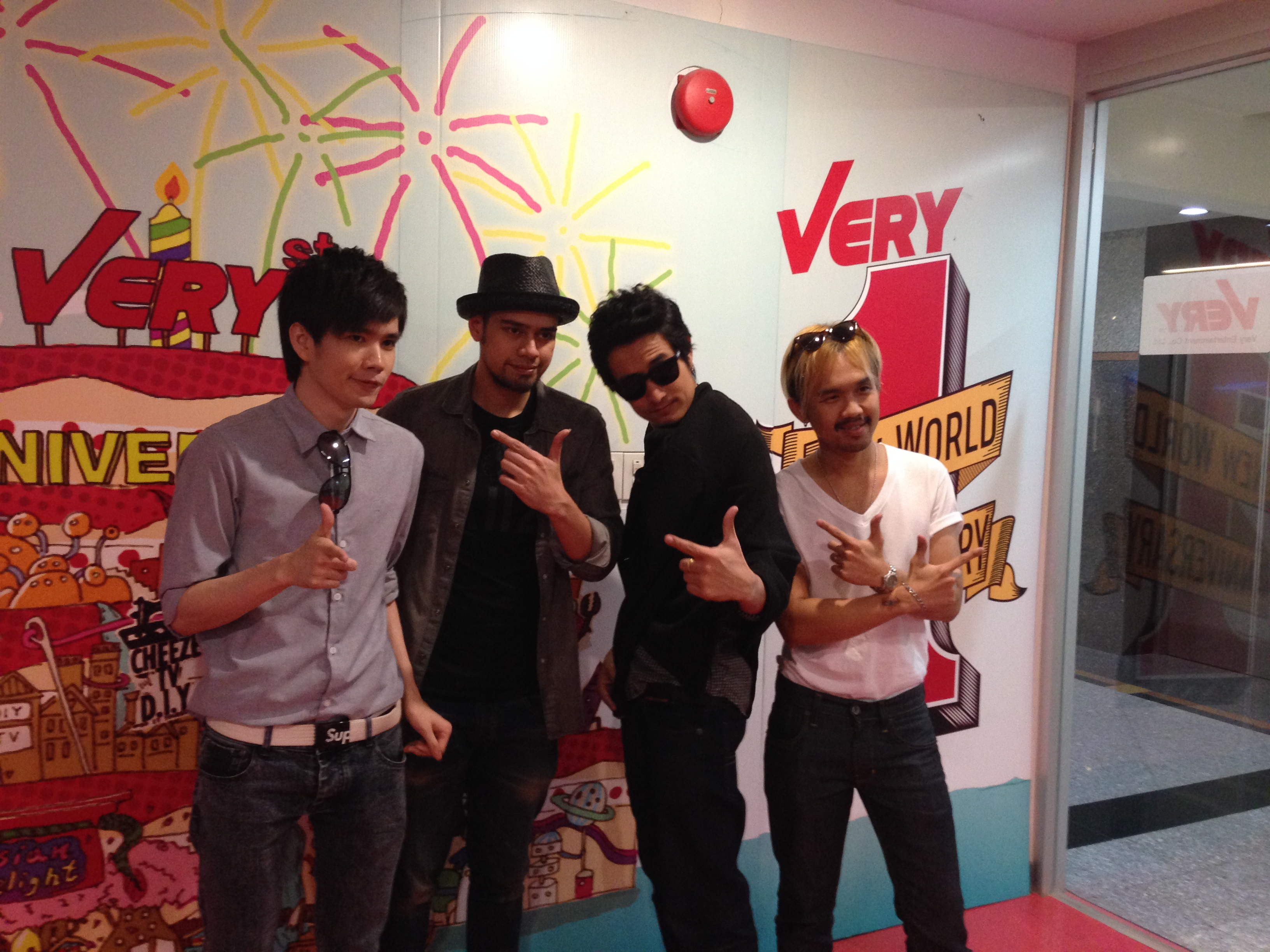 Pancake at VERY TV.